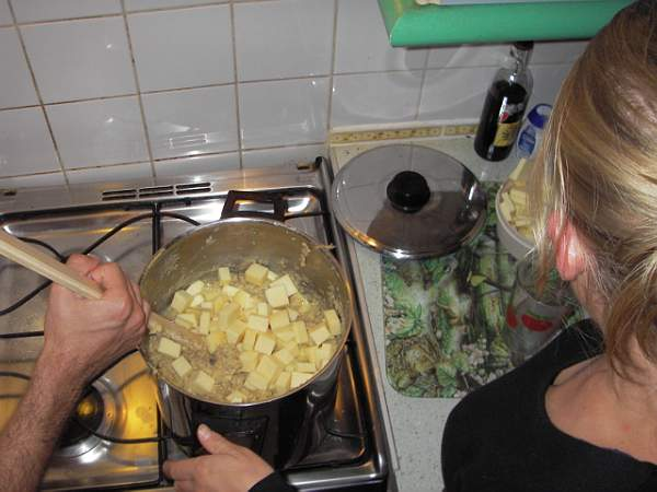 Polenta